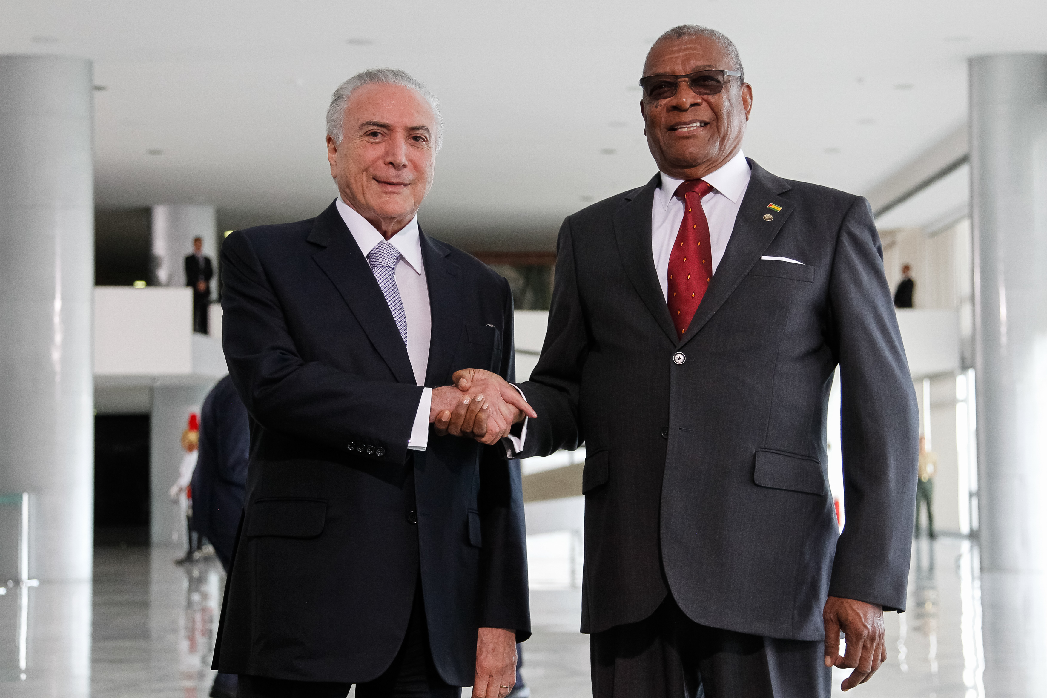 (Brasília - DF, 19/03/2018) Audiência com o Presidente da República de São Tomé e Príncipe, Evaristo do Espírito Santo Carvalho.Foto: Beto Barata/PR